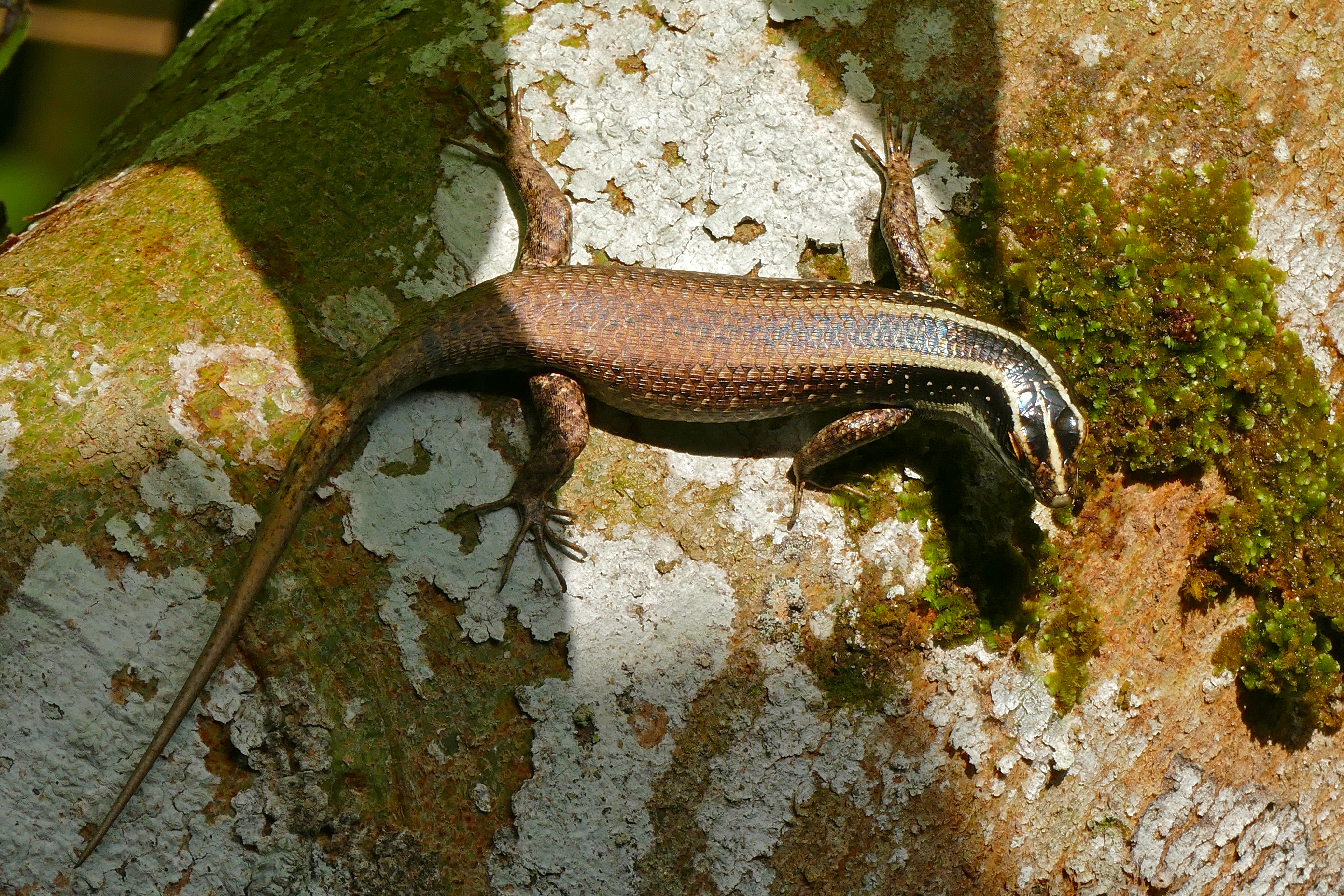 Mulu NP, Sarawak, MALAYSIA